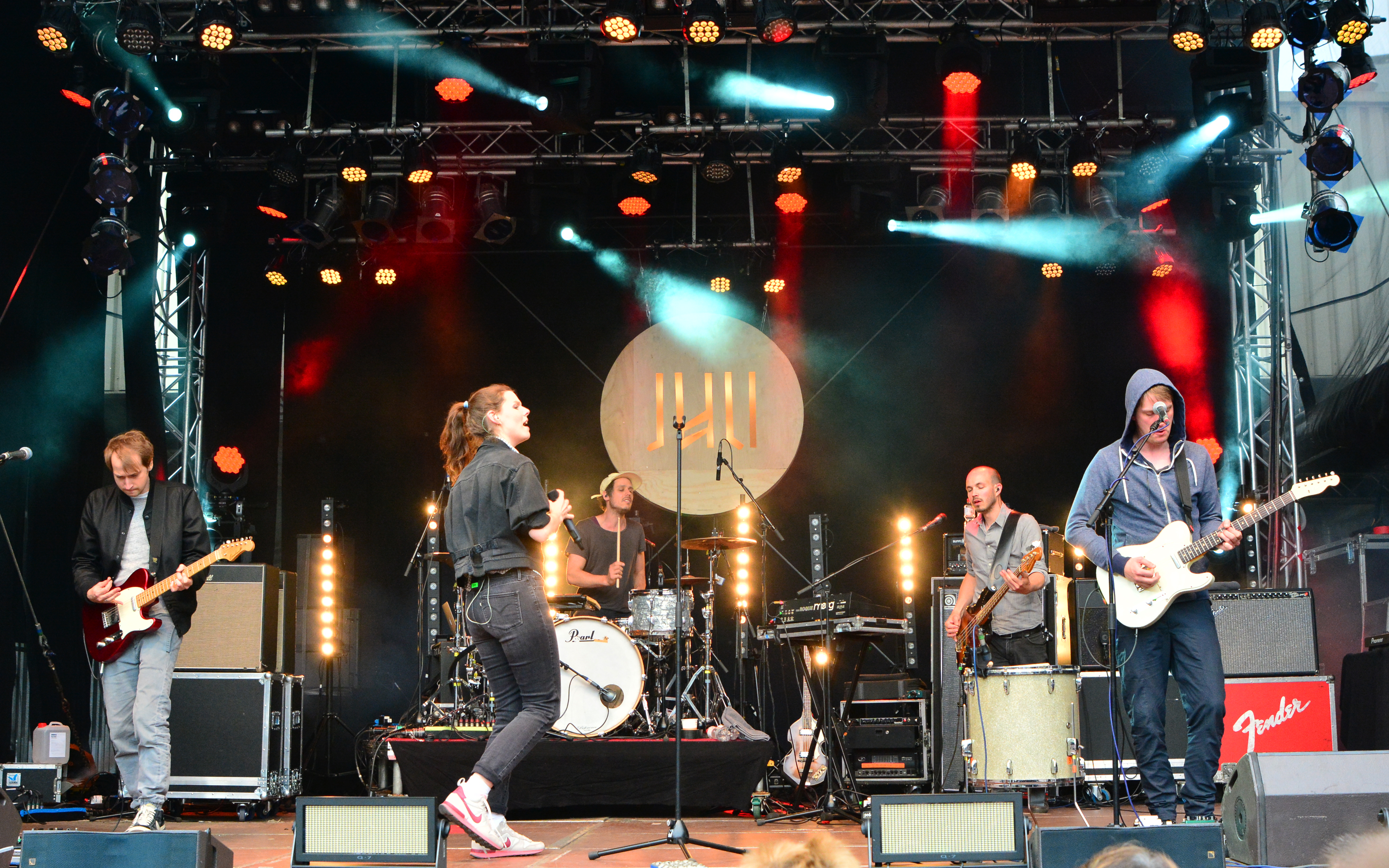 Juli beim „Holsten Brauereifest 2015“ in Hamburg